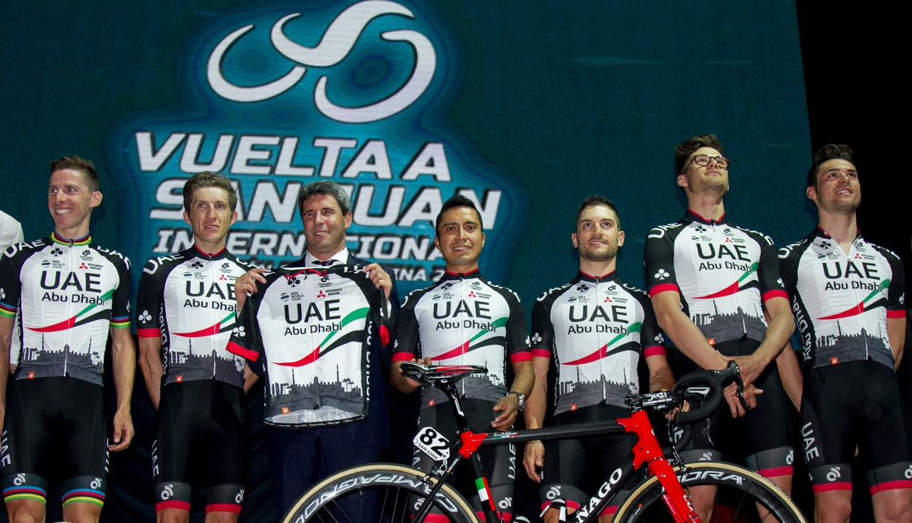 Vuelta a San Juan 2017 - UAE Abu Dhabi (Emiratos Árabes Unidos) Depicted team: UAE Abu Dhabi